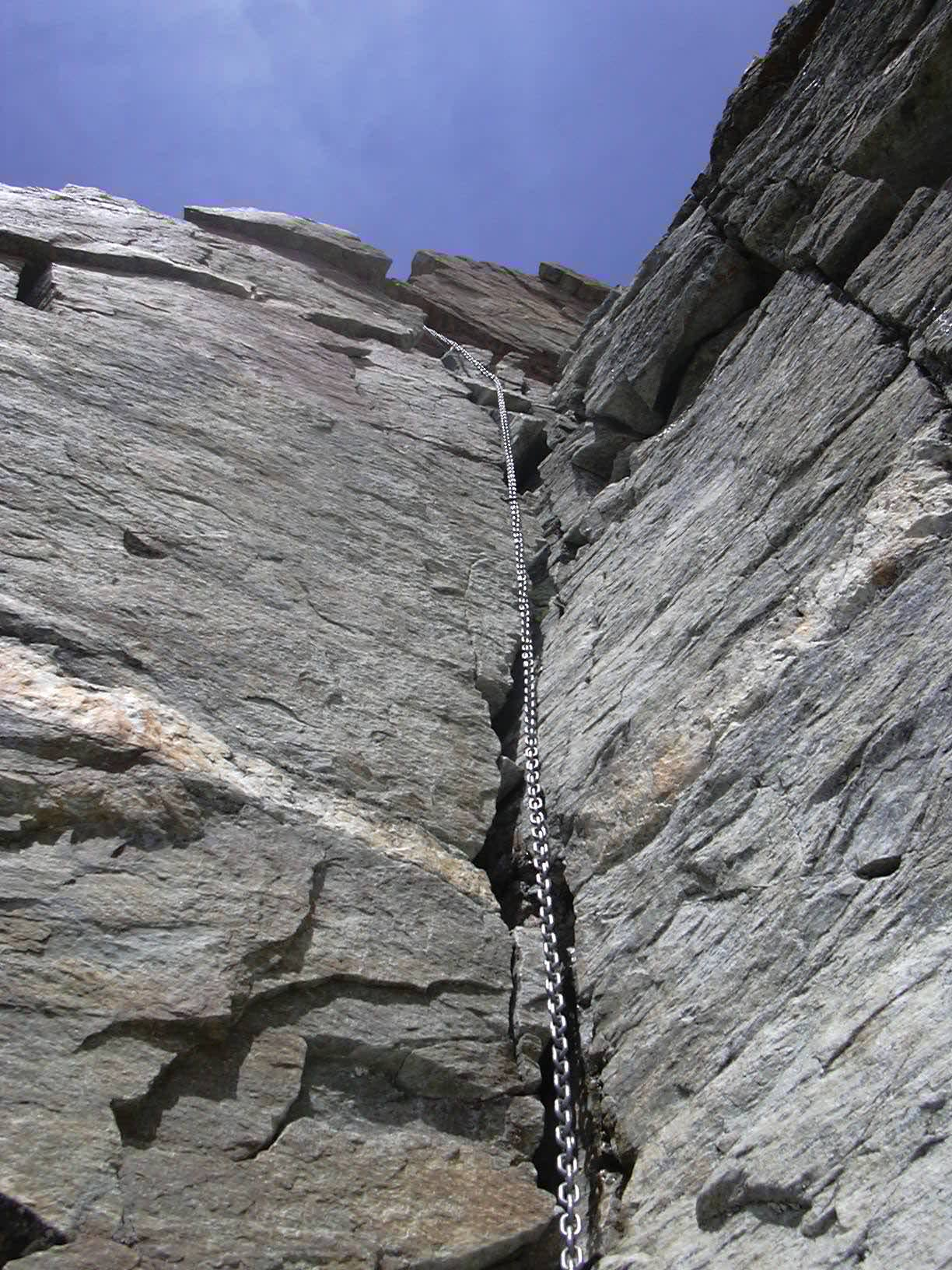 Il diedro Cheminée (12 m) pochi giorni prima della sua caduta.